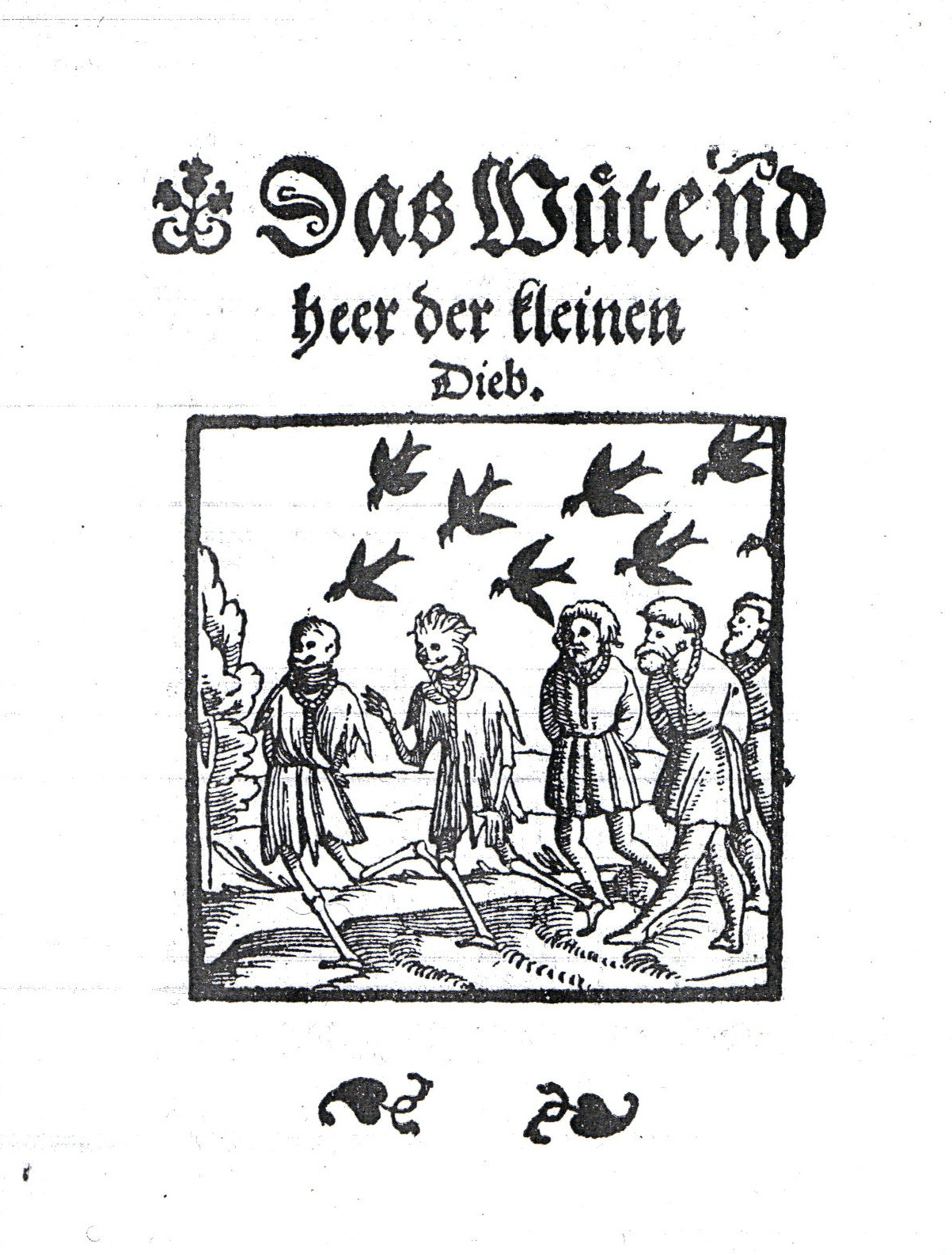 Wütendes Heer, Druck Basel 1569